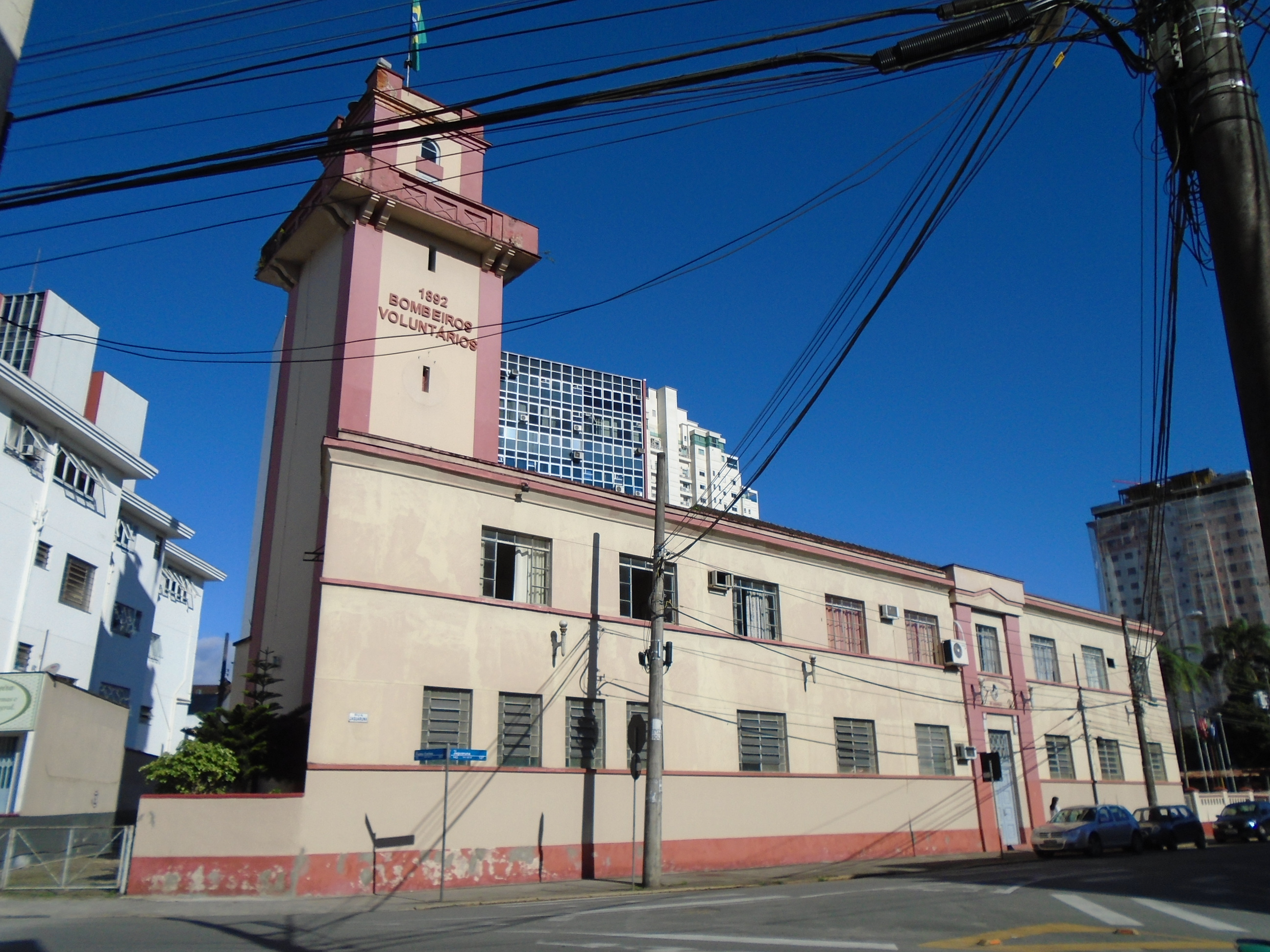 Corpo de Bombeiros Voluntários de Joinville (Brasil)